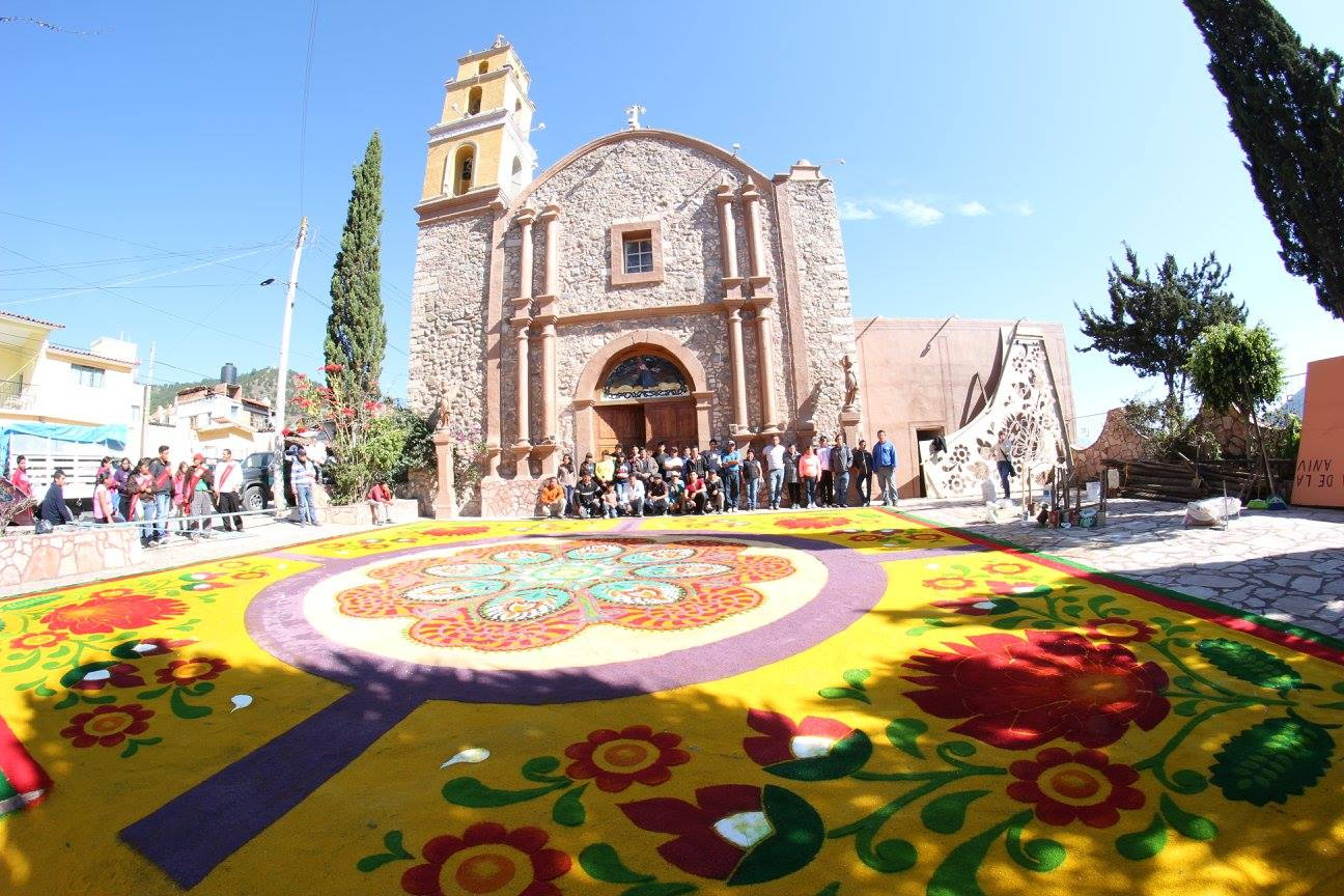 Templo católico.